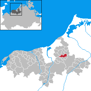 Steinfeld in Mecklenburg-Western Pomerania - District Bad Doberan